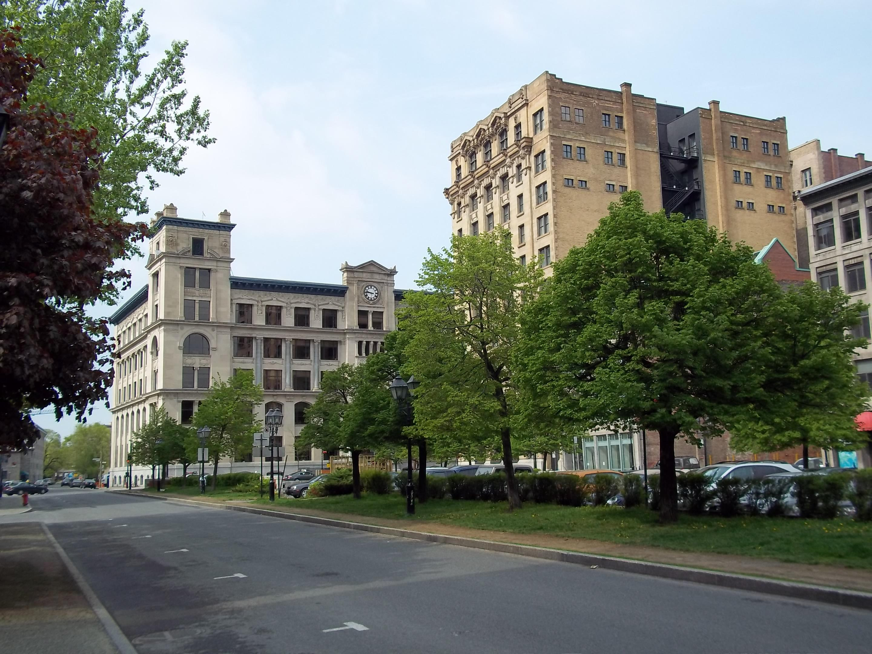 Édifice du Grand Tronc vu de la Place d'Youville, Montréal